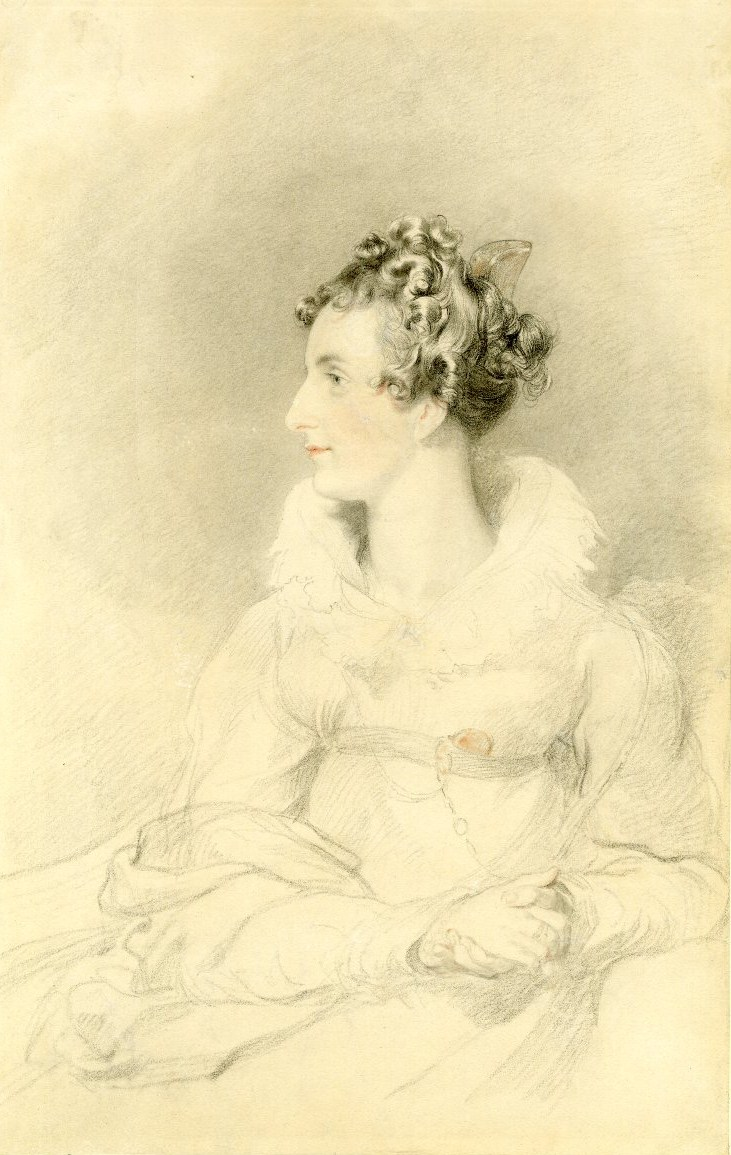 Countess Rozalie Rzewuska (1788-1865)